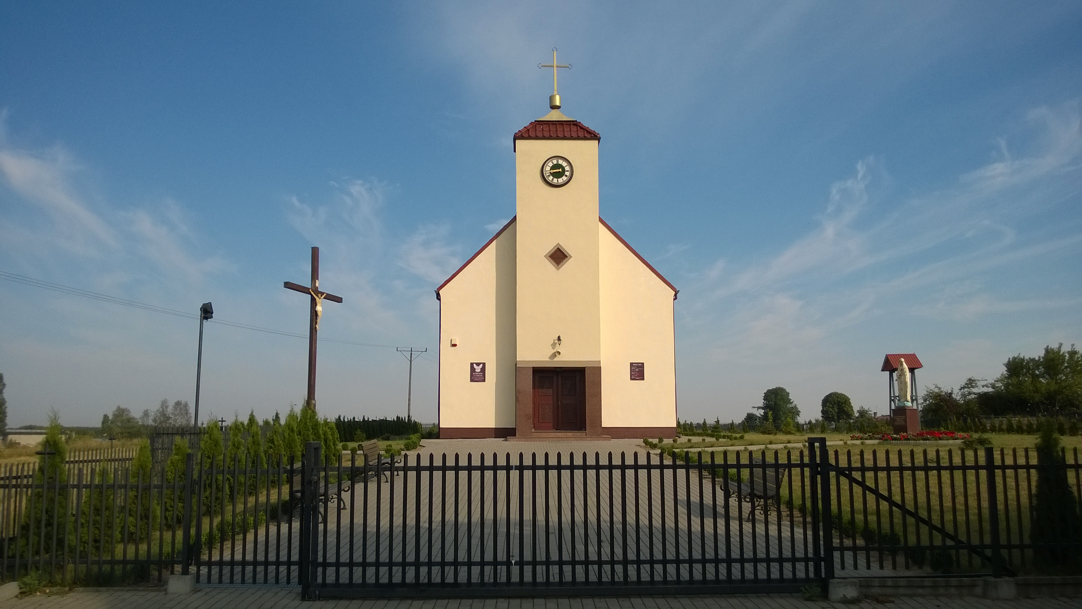 Mieszkowice, Poland